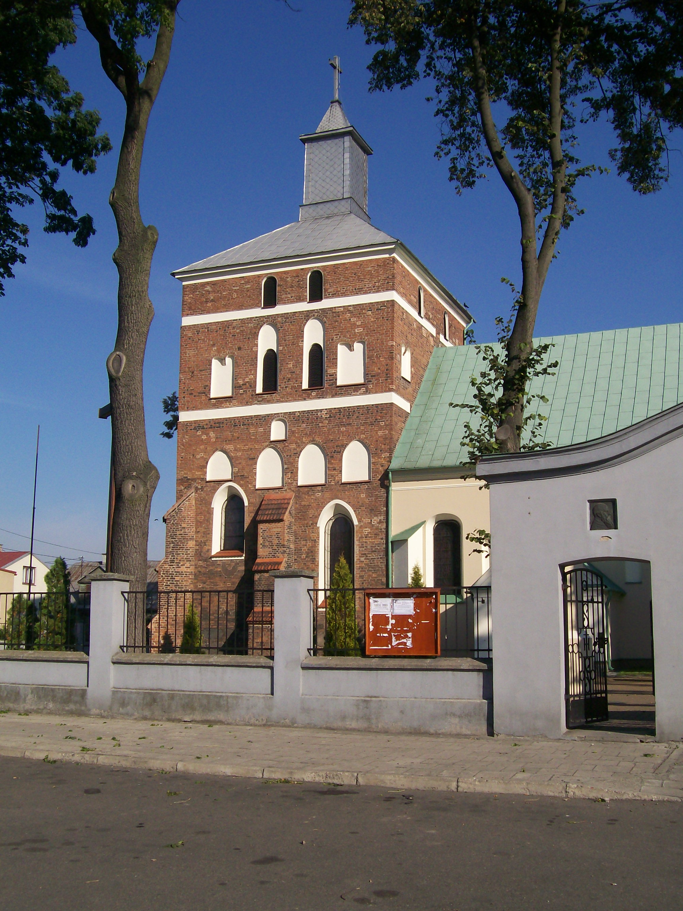 Kościół Farny w Sierpcu, pw. św. Wita, Modesta i Krescencji.